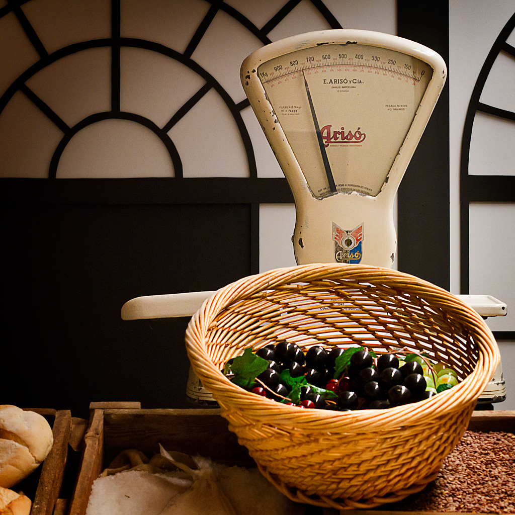 Museo del Comercio de Salamanca Detalle de la recreación del Mercado Central de Abastos de Salamanca, obra de principios del siglo XX que marca un hito en la historia comercial de Salamanca.Báscula Arisó, 1920. Colección Almacenes Madruga. Expuesta en la recreación de una Abacería dentro del Mercado Central de Abastos. Wiki Loves Art Fotografía: Juan Miguel Ávila del Arco | Darco TT Canon EOS 7D | Objetivo Canon 50mm 1.4 f/5.6 | 1/80 | ISO 2500 Museo del Comercio y la Industria Native nameMuseo del Comercio y la Industria (Salamanca)LocationSalamanca, (Spain)Coordinates40° 57′ 54.29″ N, 5° 39′ 14.79″ W Established2006Web page control : Q6034415 VIAF: 169904596 BNE: XX4875307 institution QS:P195,Q6034415